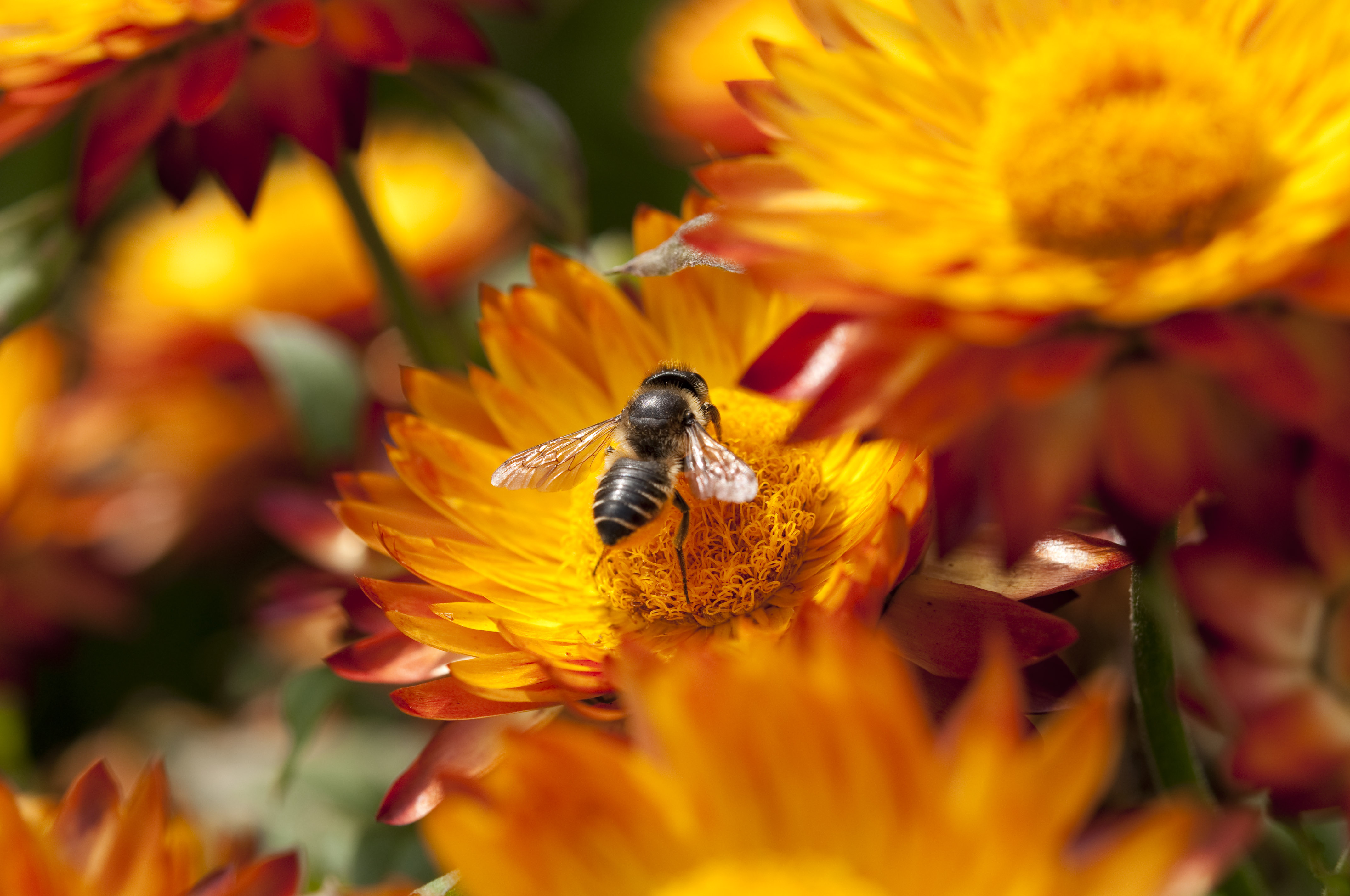 Strohblume